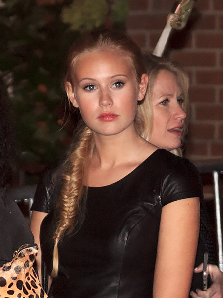 Toronto International Film Festival 2015